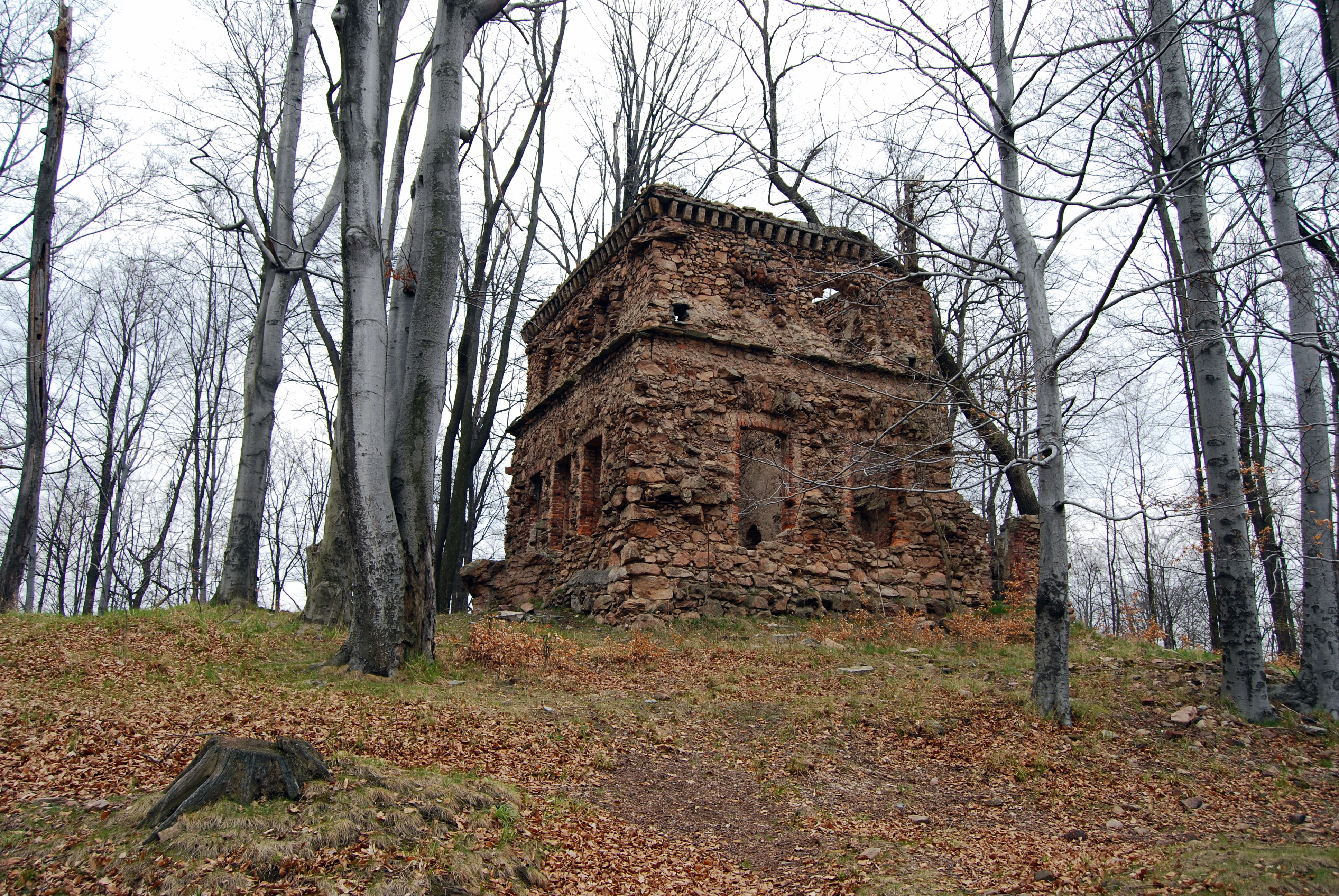 Kowary Ciszyca - wieża widokowa w parku pałacowym (zabytek nr A/2177 z dn. 23.04.10)